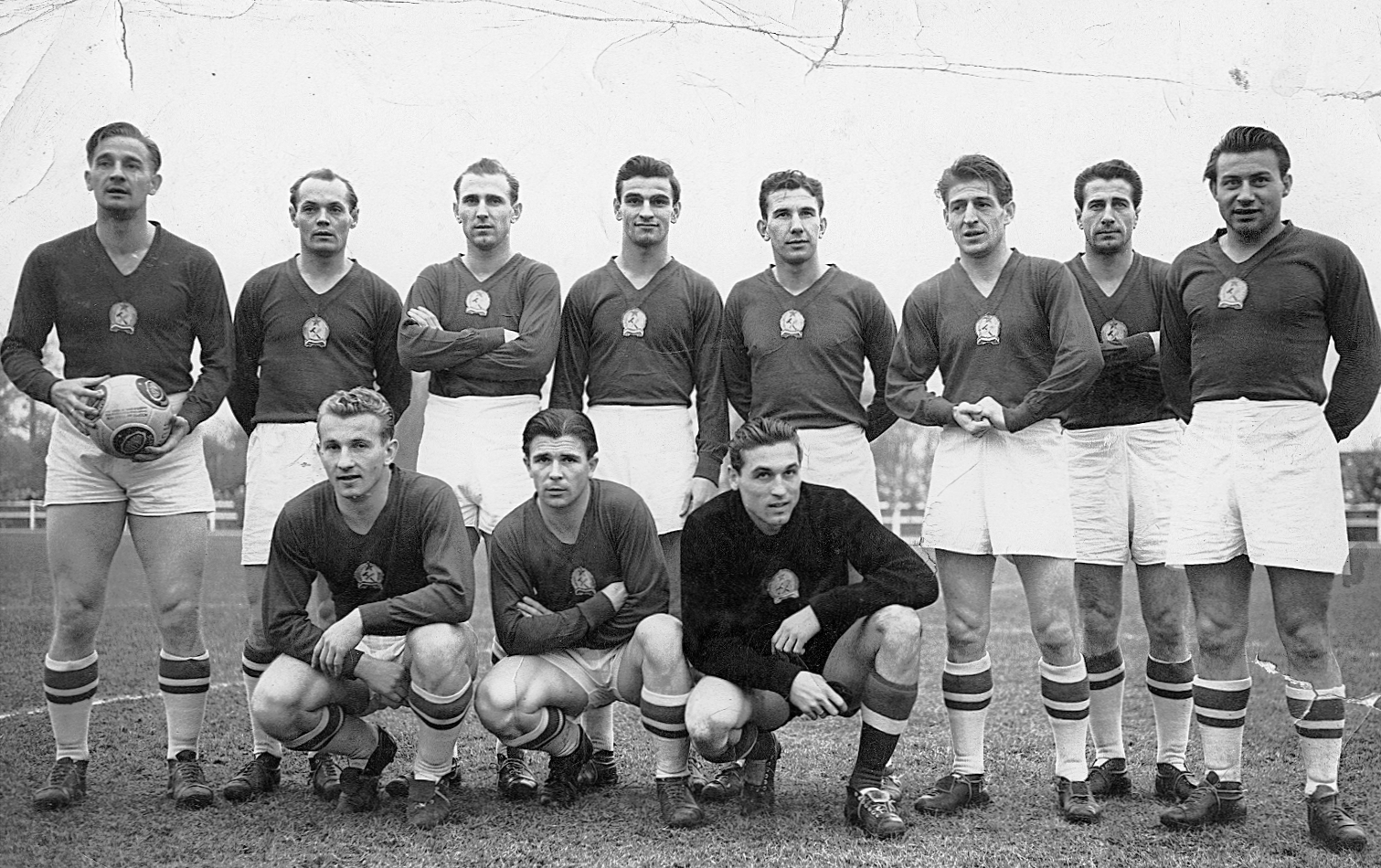 Az Aranycsapat. Lóránt Gyula, Buzánszky Jenő, Hidegkúti Nándor, Kocsis Sándor, Zakariás József, Czibor Zoltán, Bozsik József, Budai II László, guggol: Lantos Mihály, Puskás Ferenc, Grosics Gyula. Location: Hungary Tags: soccer team, celebrity, crest Title: Az Aranycsapat. Lóránt Gyula, Buzánszky Jenő, Hidegkúti Nándor, Kocsis Sándor, Zakariás József, Czibor Zoltán, Bozsik József, Budai II László, guggol: Lantos Mihály, Puskás Ferenc, Grosics Gyula.